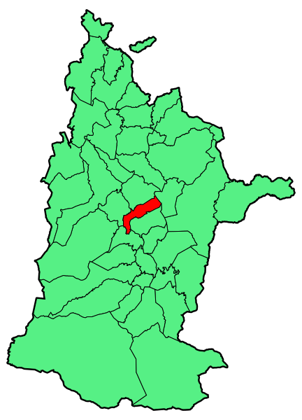 Aipaturiko udalerriaren kokapena Zuberoan